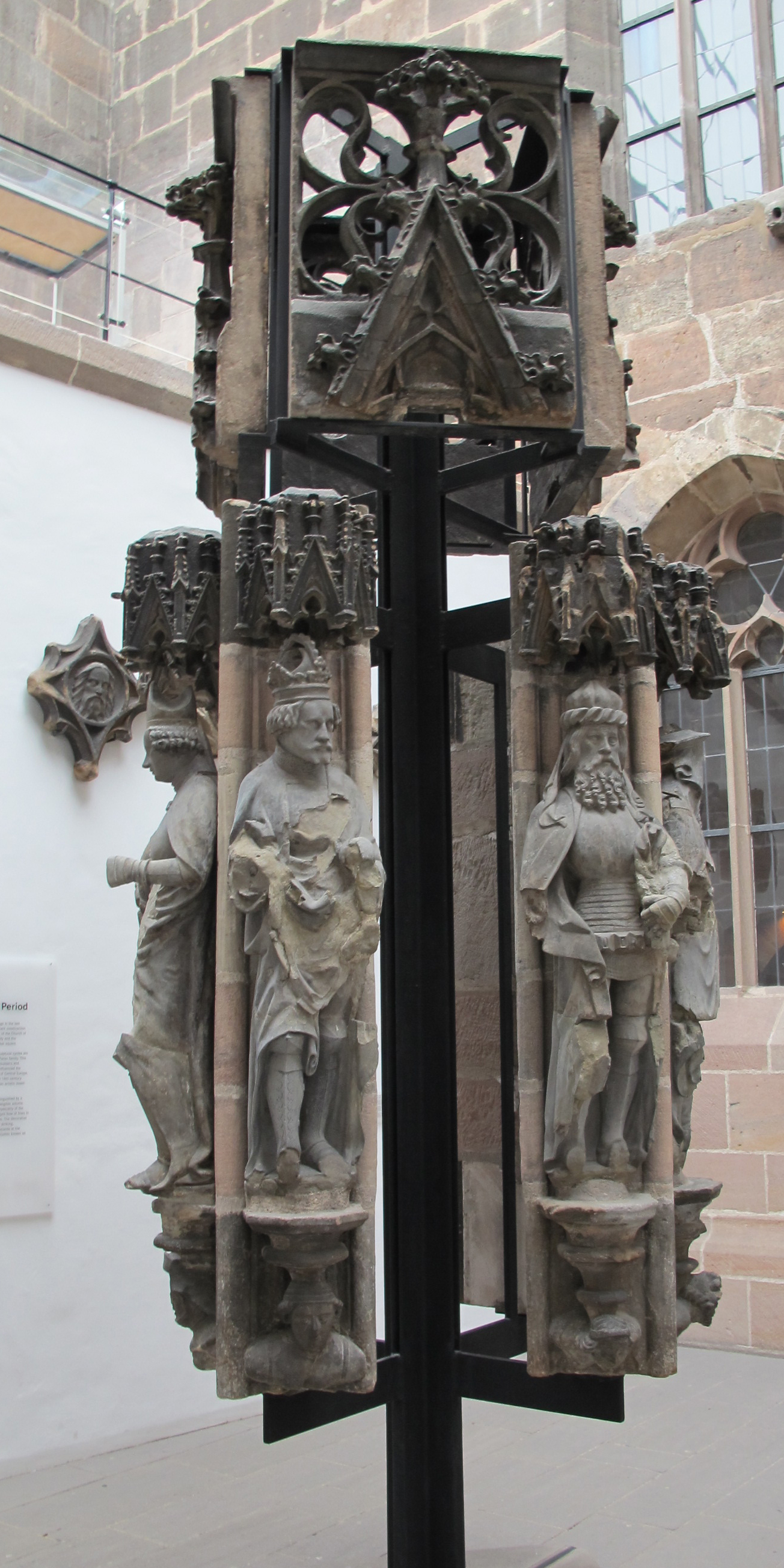 Frammenti dell'originale Bella Fontana all'Hauptmarkt di norimberga, 1385-1392